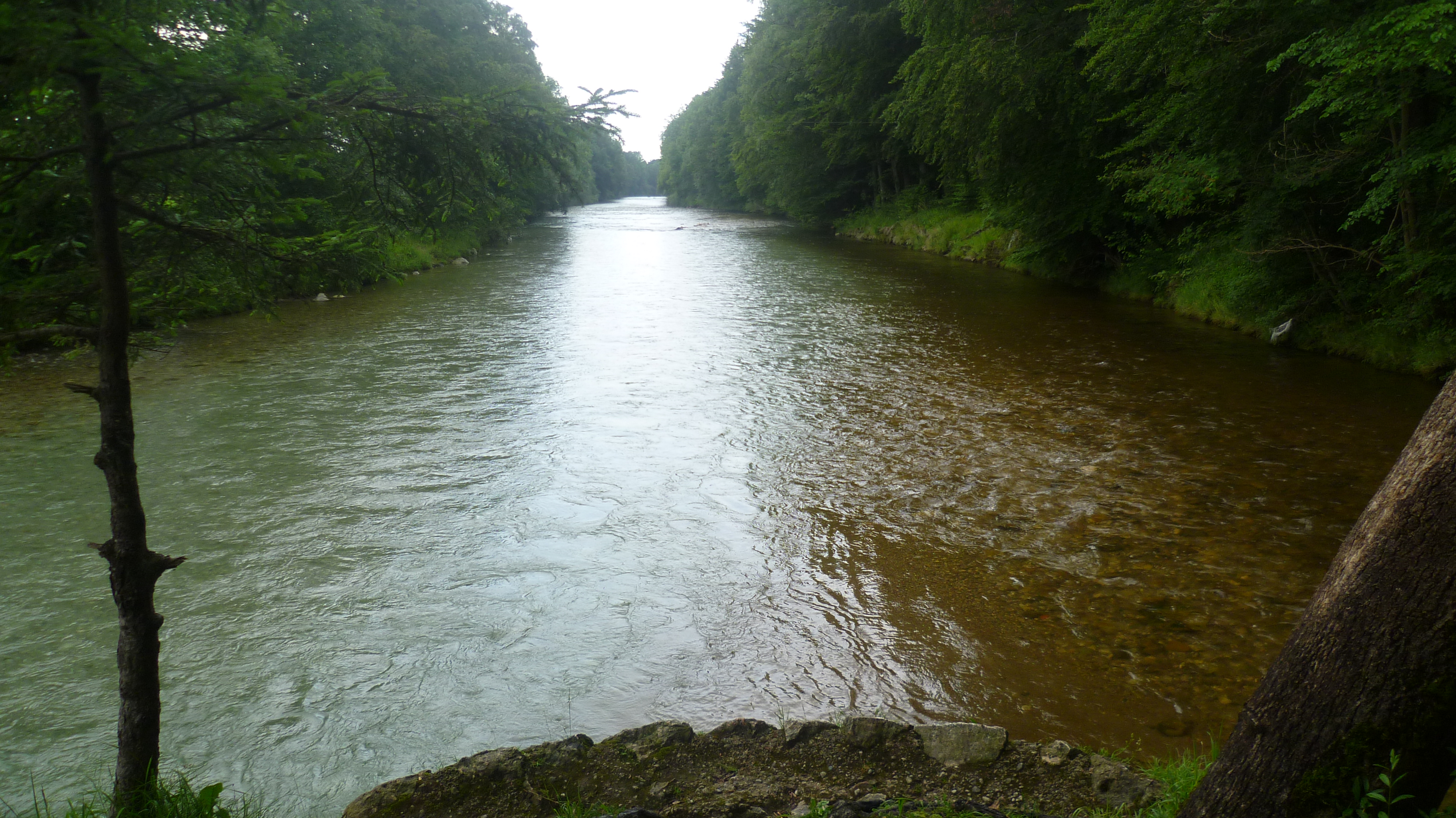 Der Zusammenfluss der Weißen (links) und Roten Traun (rechts)